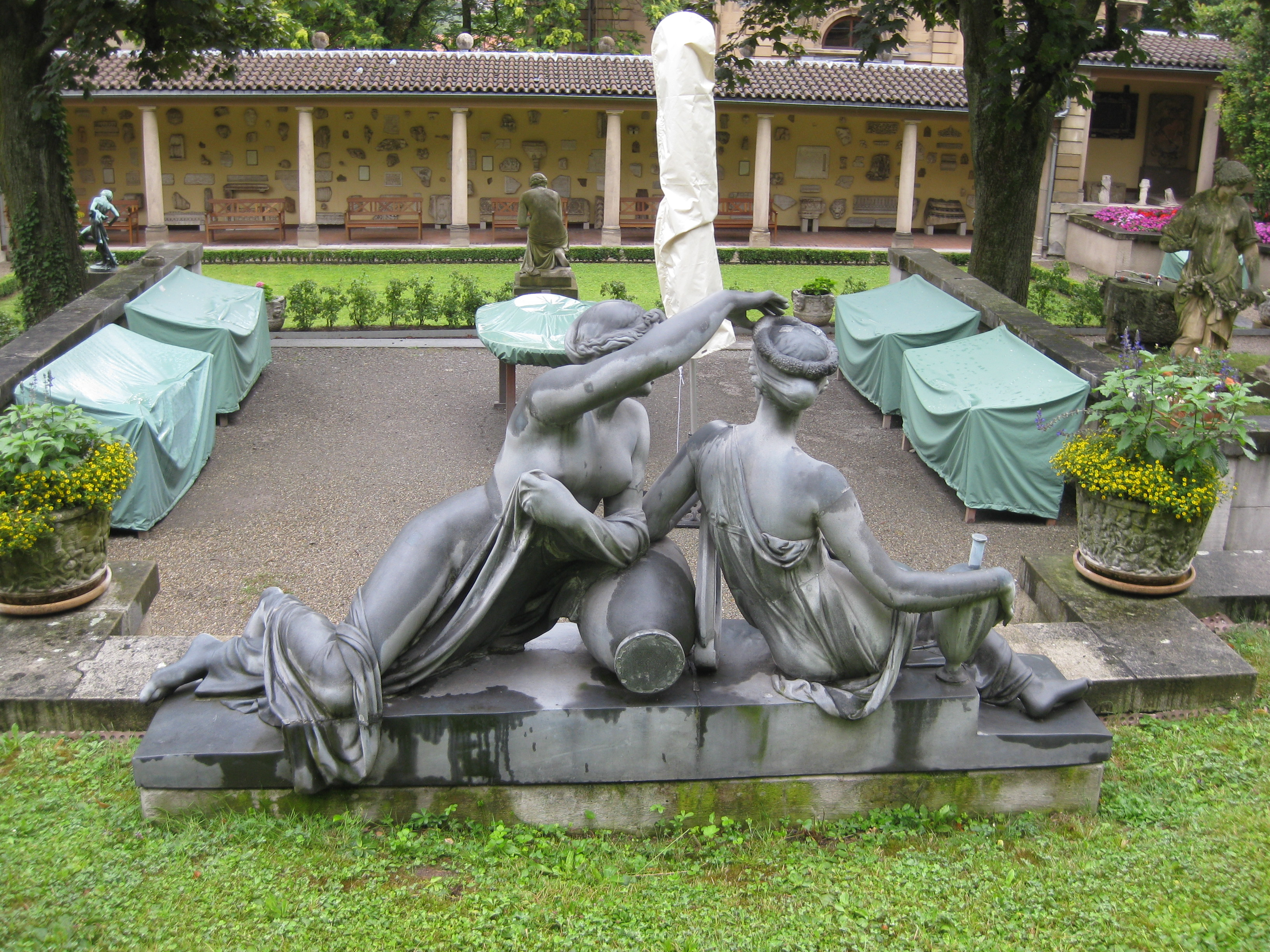 Johann Heinrich Dannecker: Wasser- und Wiesennymphe, Rückseite. Zinkguss von NN (um 1933), Stuttgart, Städtisches Lapidarium